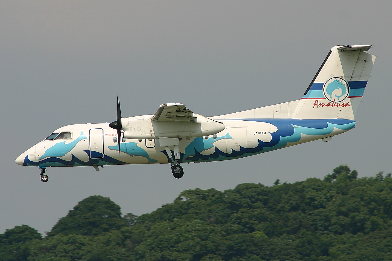 天草エアライン ボンバルディア DHC-8-103Q Dash 8 JA81AM 福岡空港